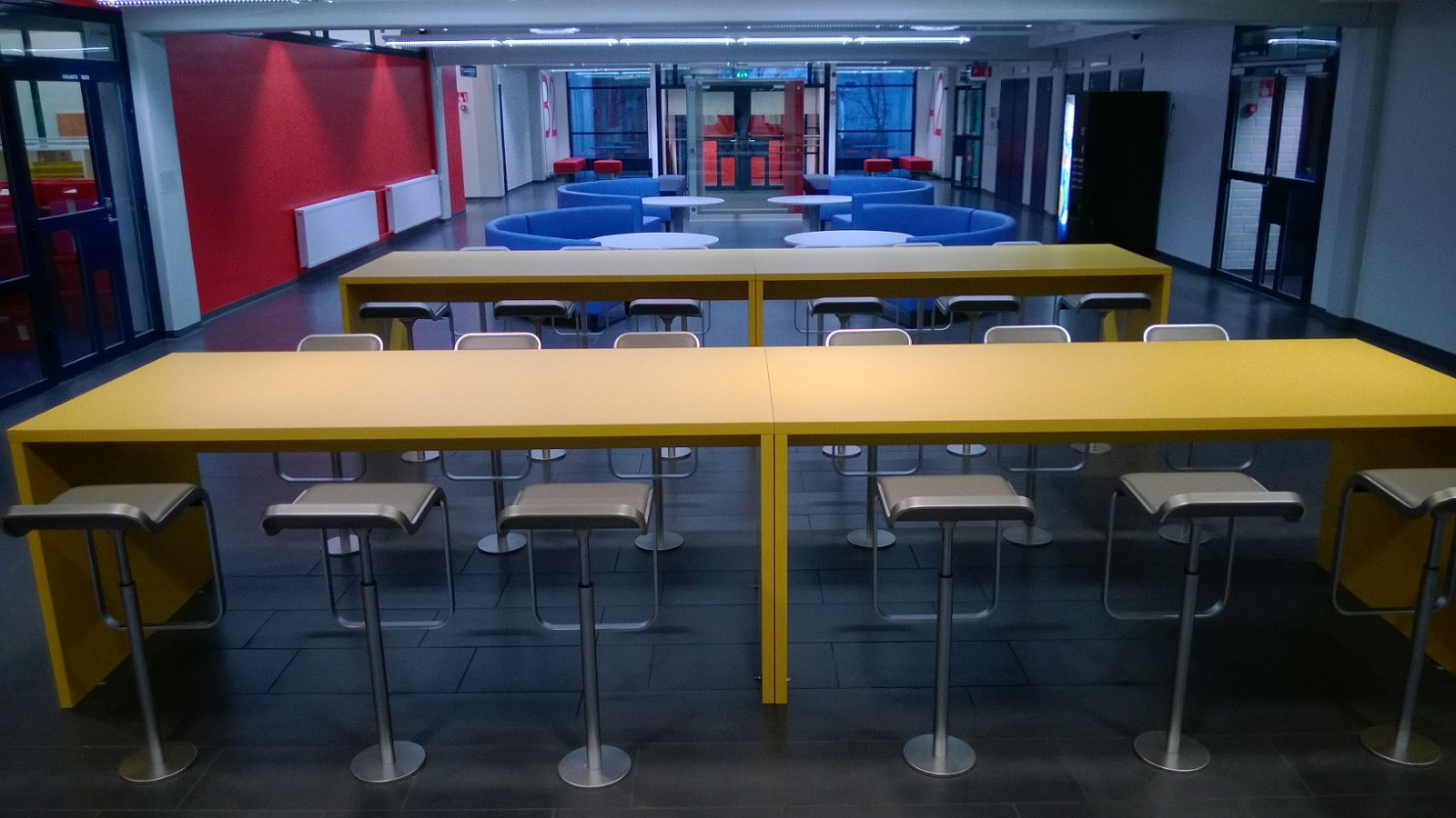 Espoonlahden lukion oleskeluaula.